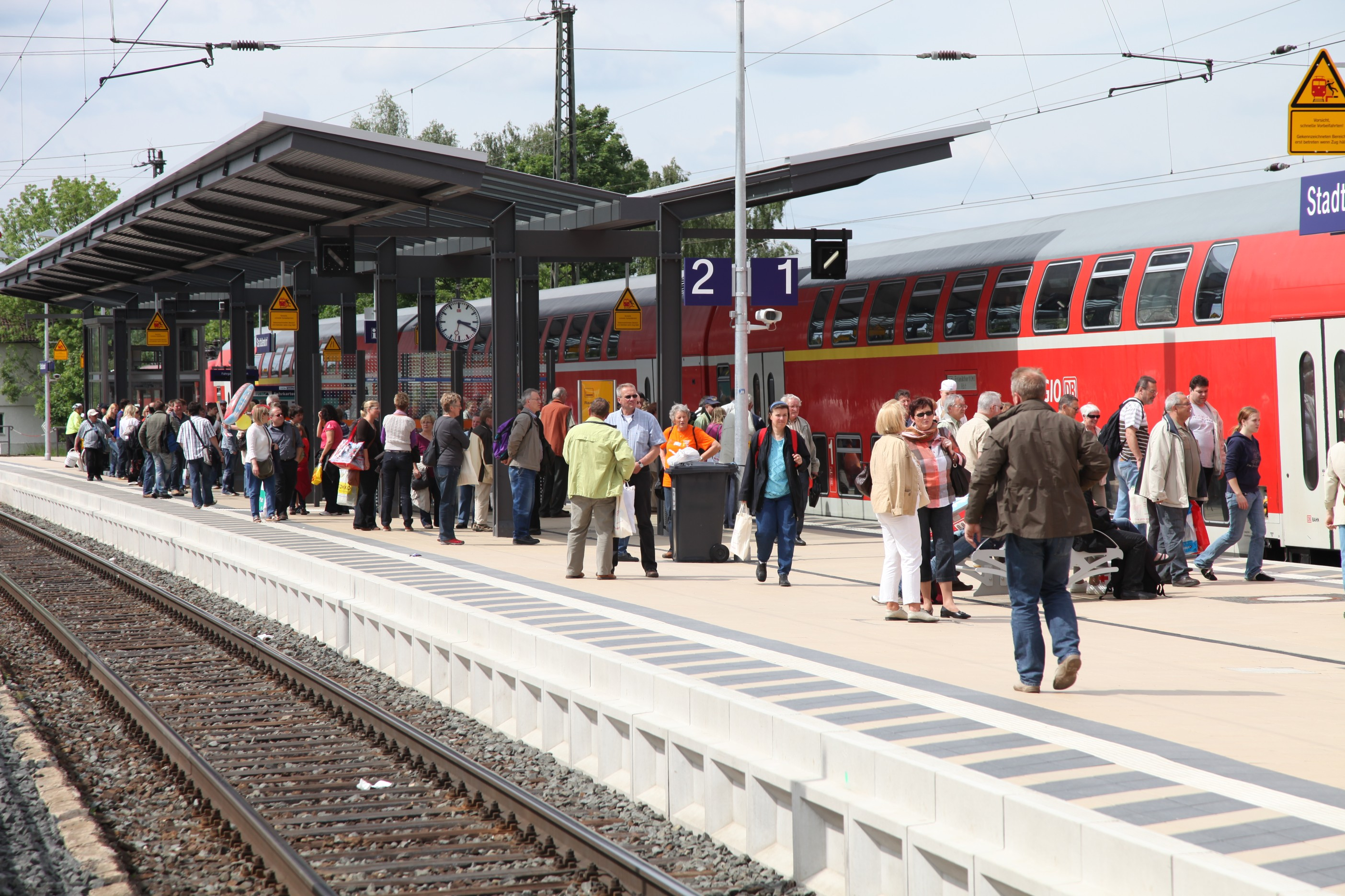 Bahnhof Stadtallendorf während des Hessentages 2010. Blick auf die Bahnsteige 1 und 2. Am Gleis 1 hält ein Regionalexpress von Kassel Hbf nach Frankfurt am Main Hbf.